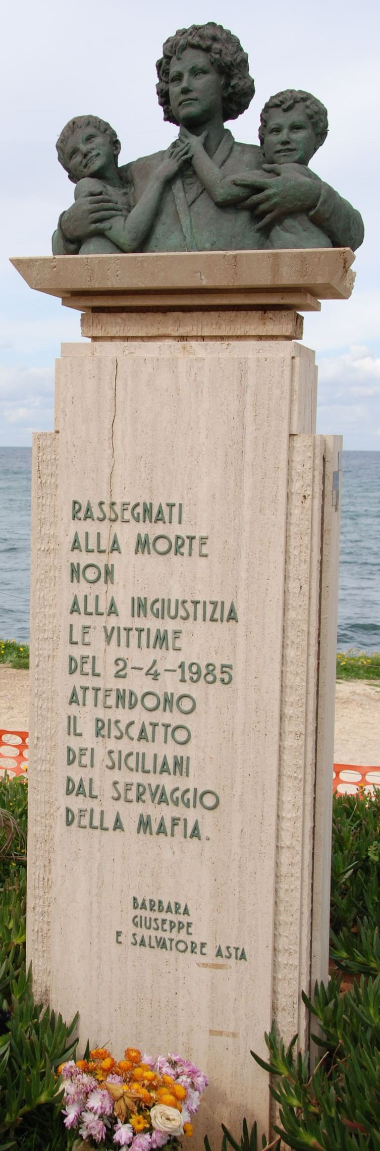 opera pubblica di Domenico Li Muli del 1986 in ricordo delle vittime della Strage di Pizzolungo (TP) del 1985